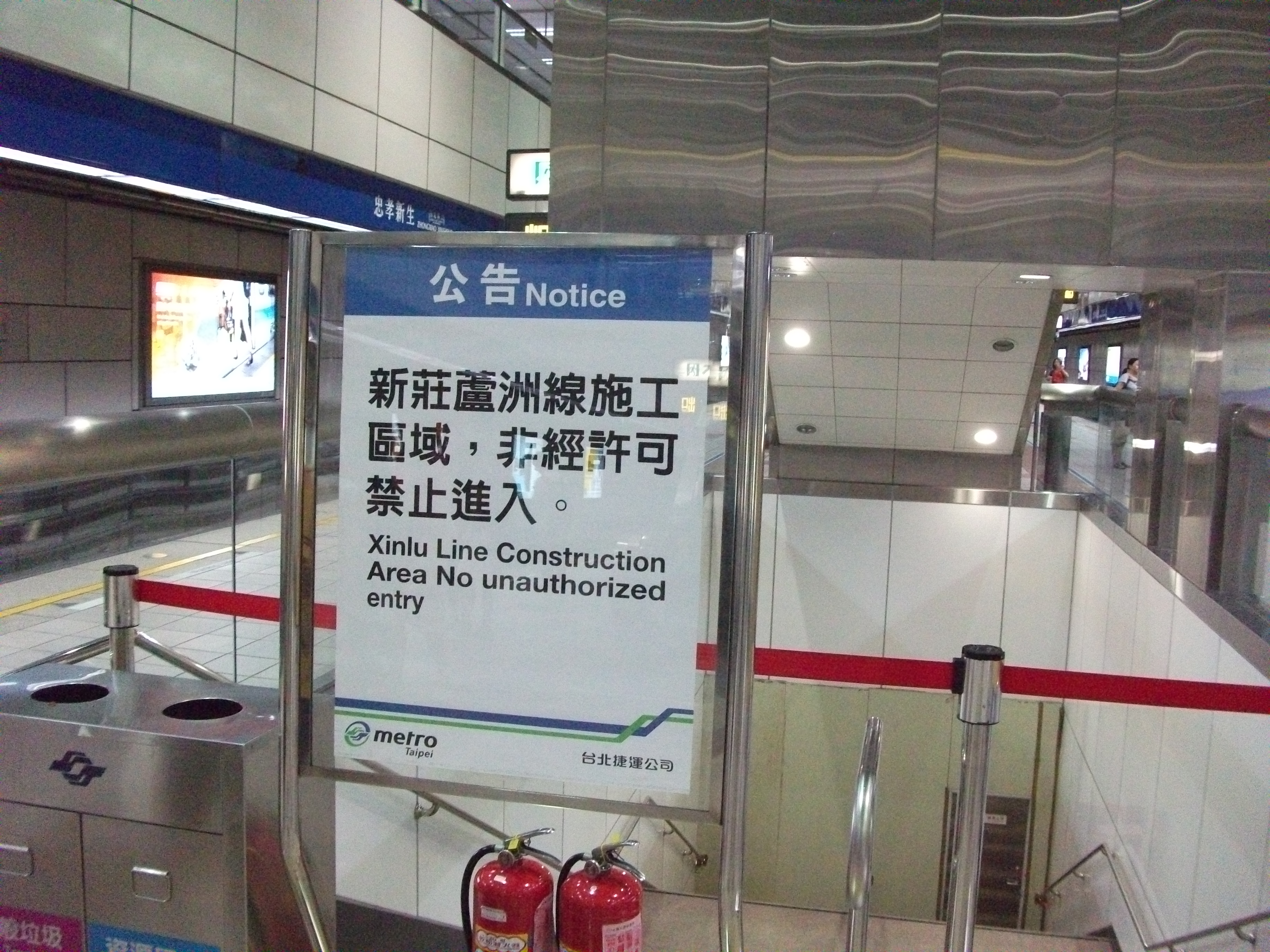 中文（台灣）: 台北捷運忠孝新生站蘆洲線月台通車前，蘆洲線施工區域禁止進入標語。